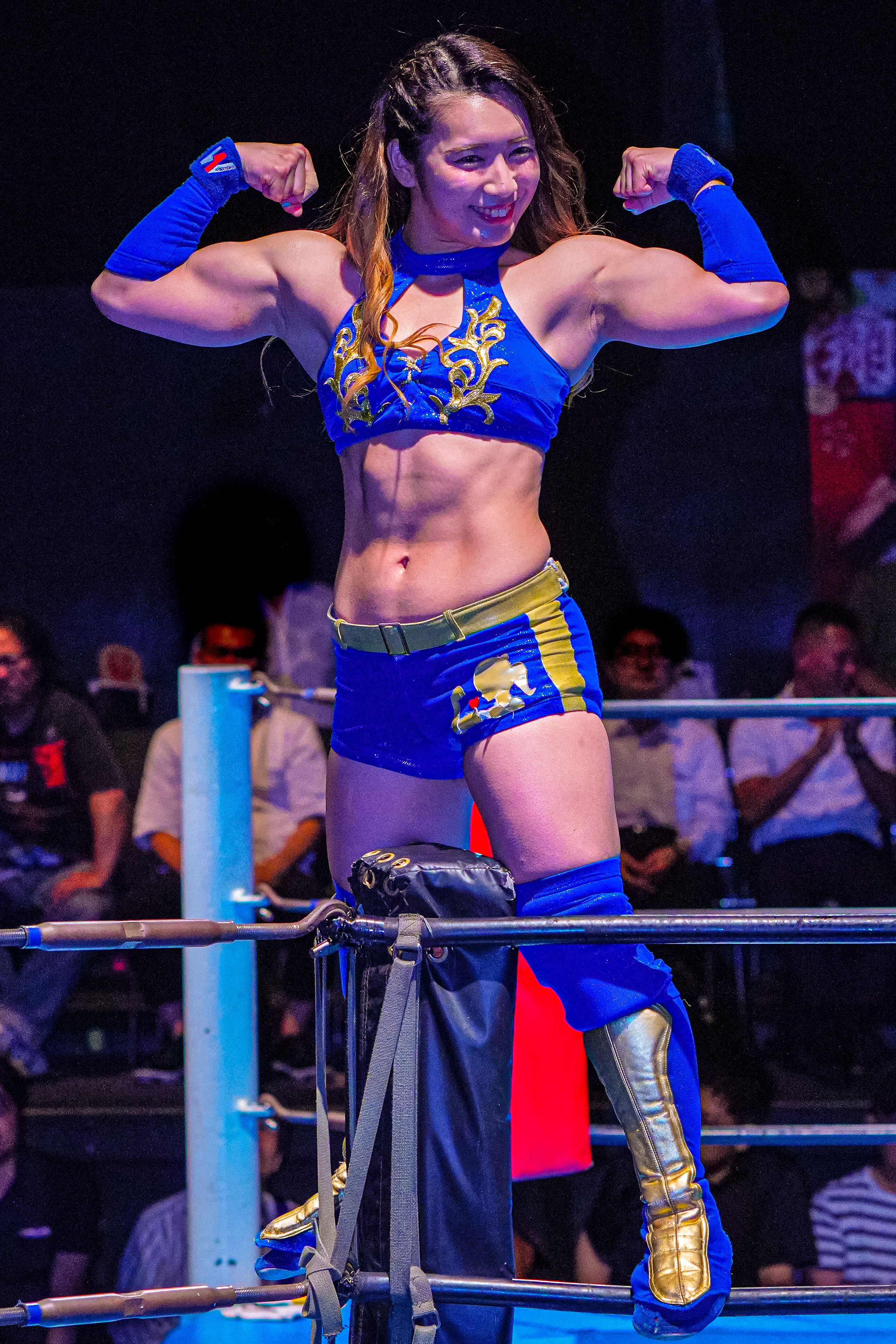 2019.07.31 新木場 1st RING